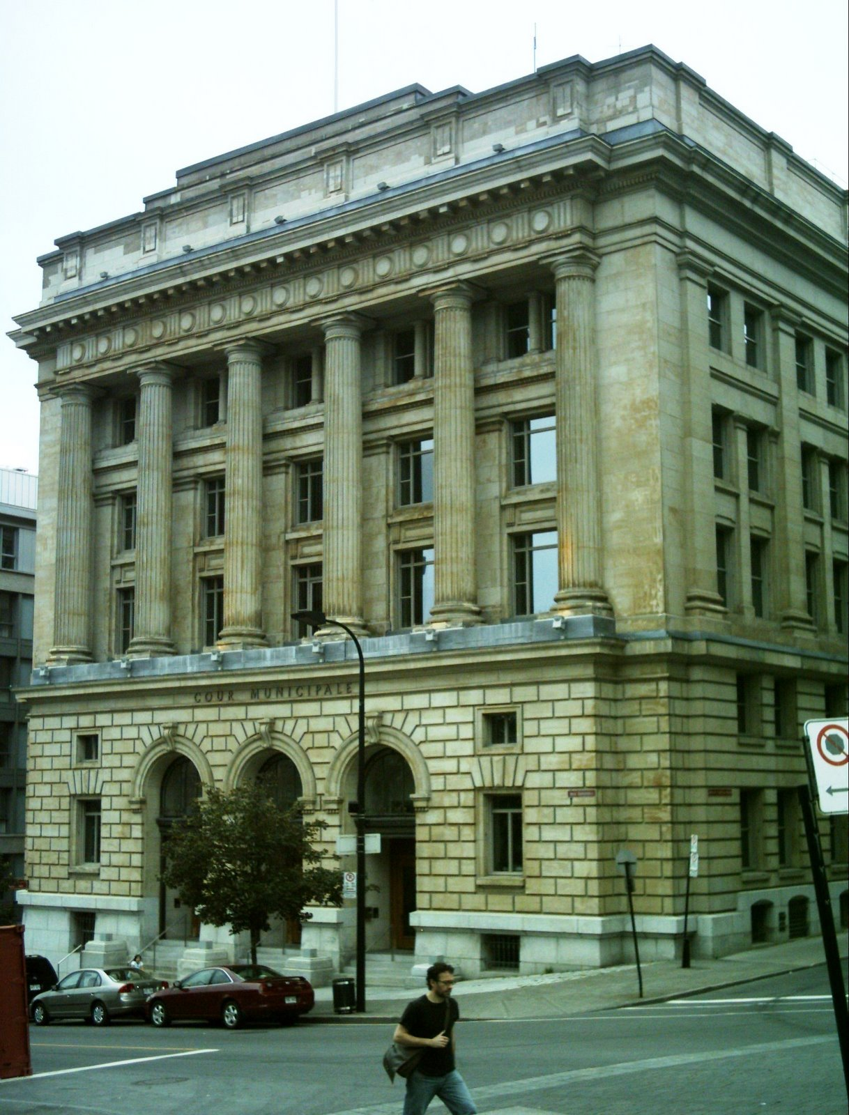 La cour municipale de Montréal, rue Gosford dans le Vieux-Montréal